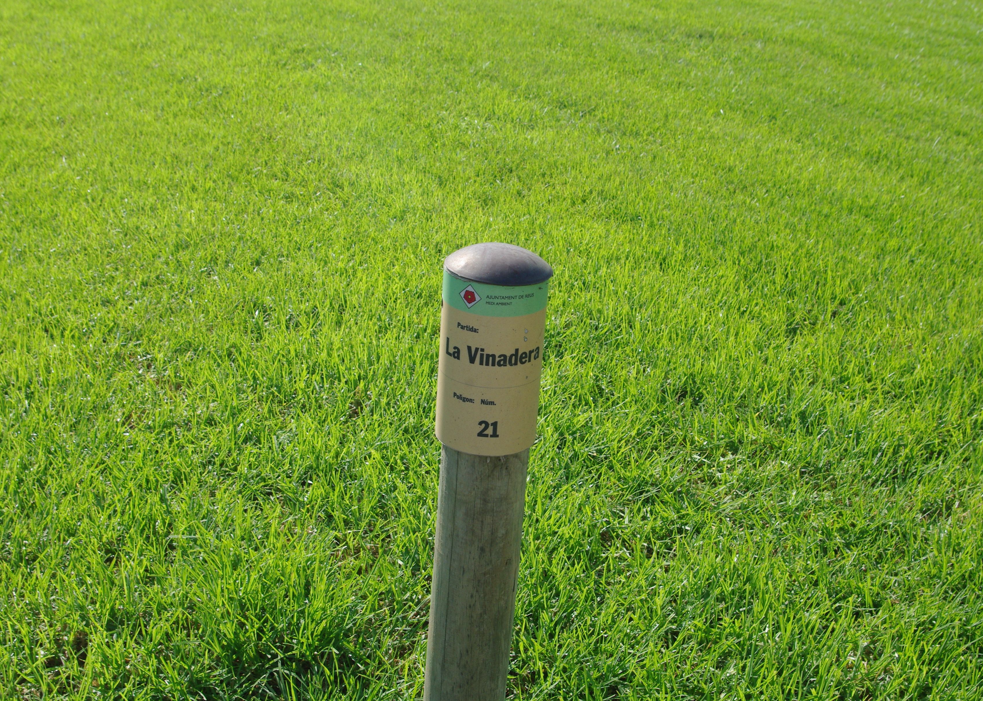 Indicador d'una parcel·la de la partida de la Vinadera, vora Villablanca, al terme de Reus